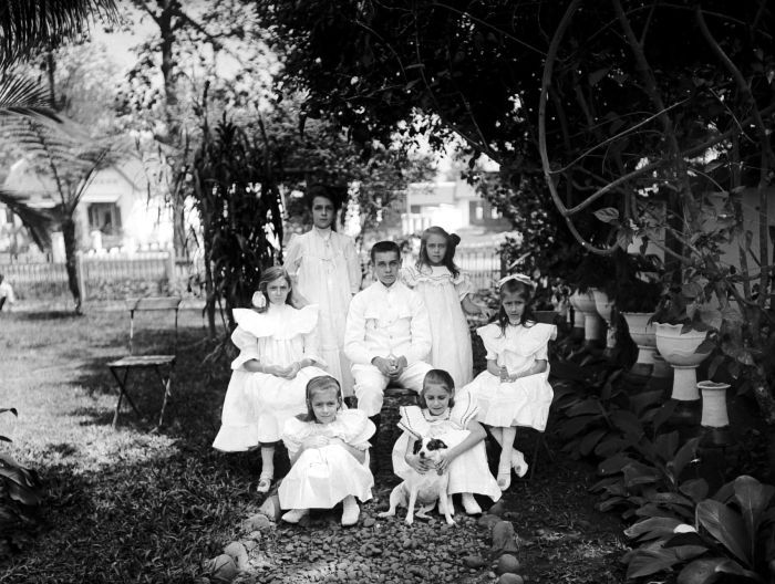 Negatief. Portret van een groep Europese kinderen met hond in de voortuin van een woonhuis aan de Tjelaket in Malang